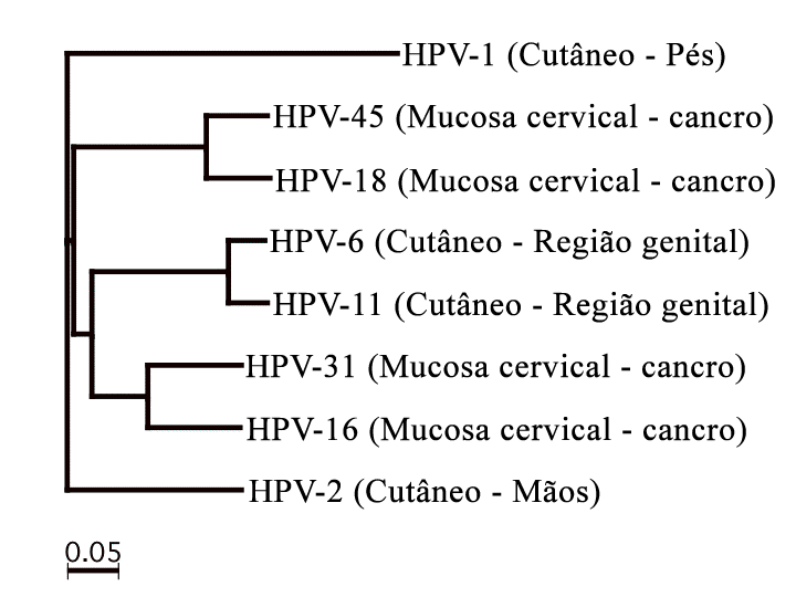 Tipos comuns de HPV, locais que infectam e consequências.